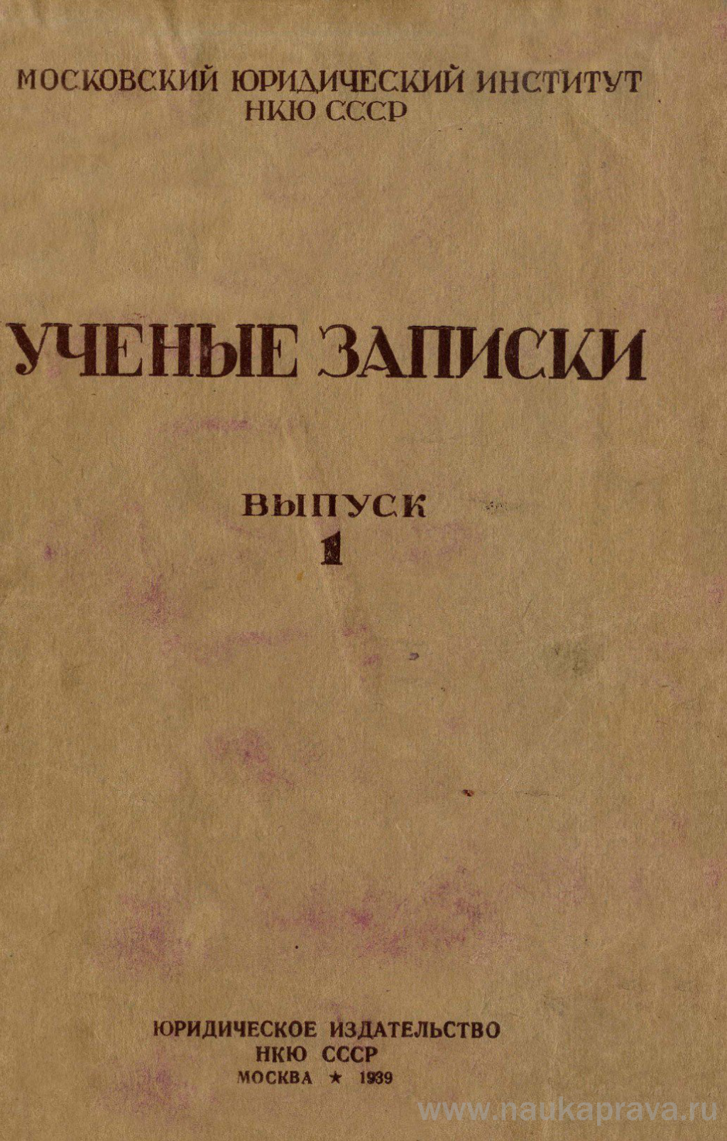 Ученые записки МЮИ